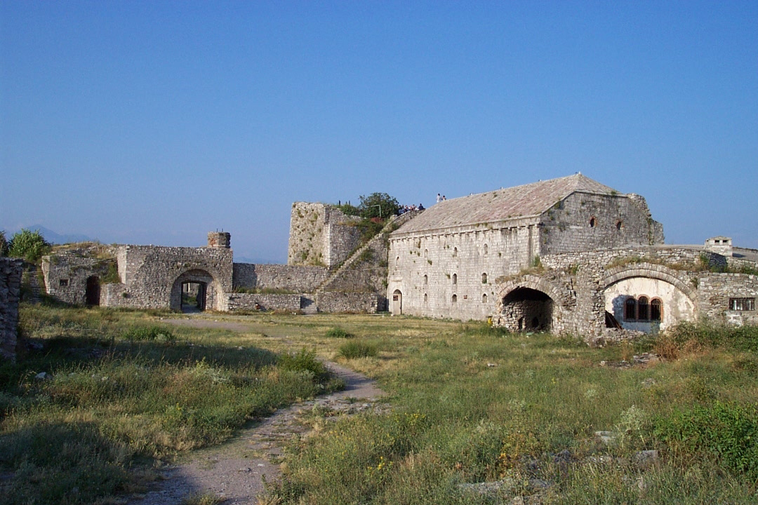 Pevnost Rozafa v Albánii, vlastní obrázek